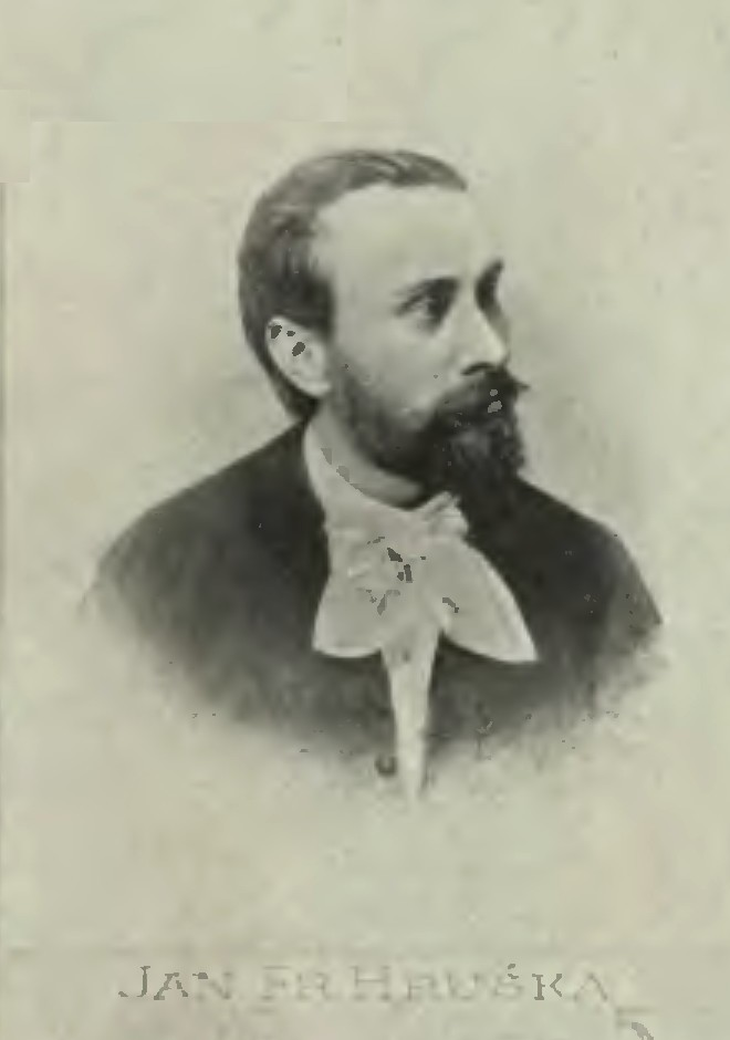 Portrét – Jan František Hruška (1865 - 1937), Český národopisec a spisovatel.